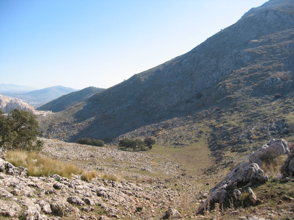 Sierra de Alhama